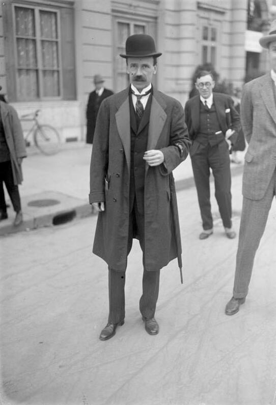 Graf Bethlen, der bekannte ungarische Ministerpräsident, wird Berlin besuchen! Graf Bethlen, ungarischer Ministerpräsident, welcher am 22. November zu Besuch in Berlin erwartet wird.